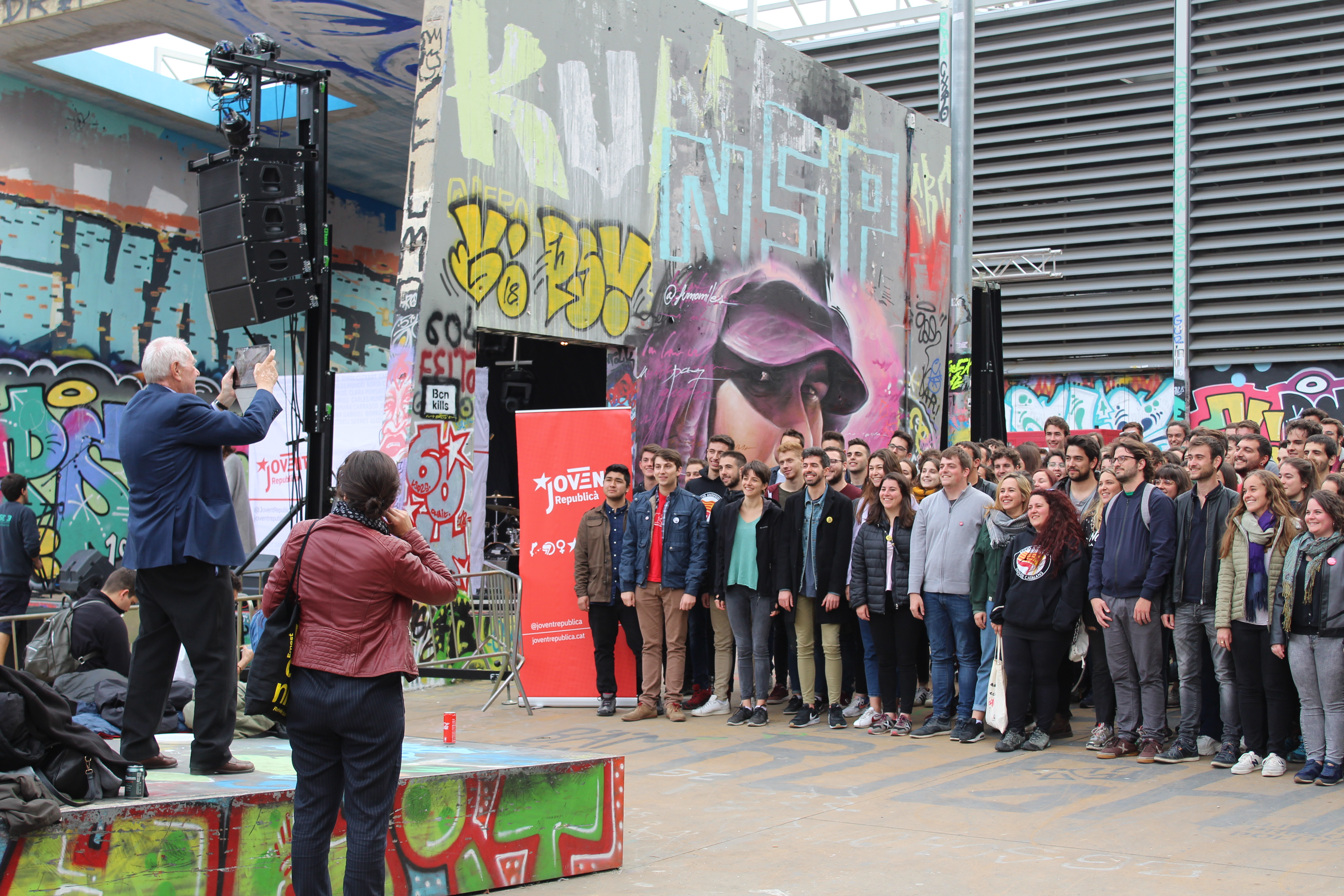 Militants i candidates municipals del Jovent Republicà en un acte a Barcelona, fent la foto a l'esquerra és en Ernest Maragall.